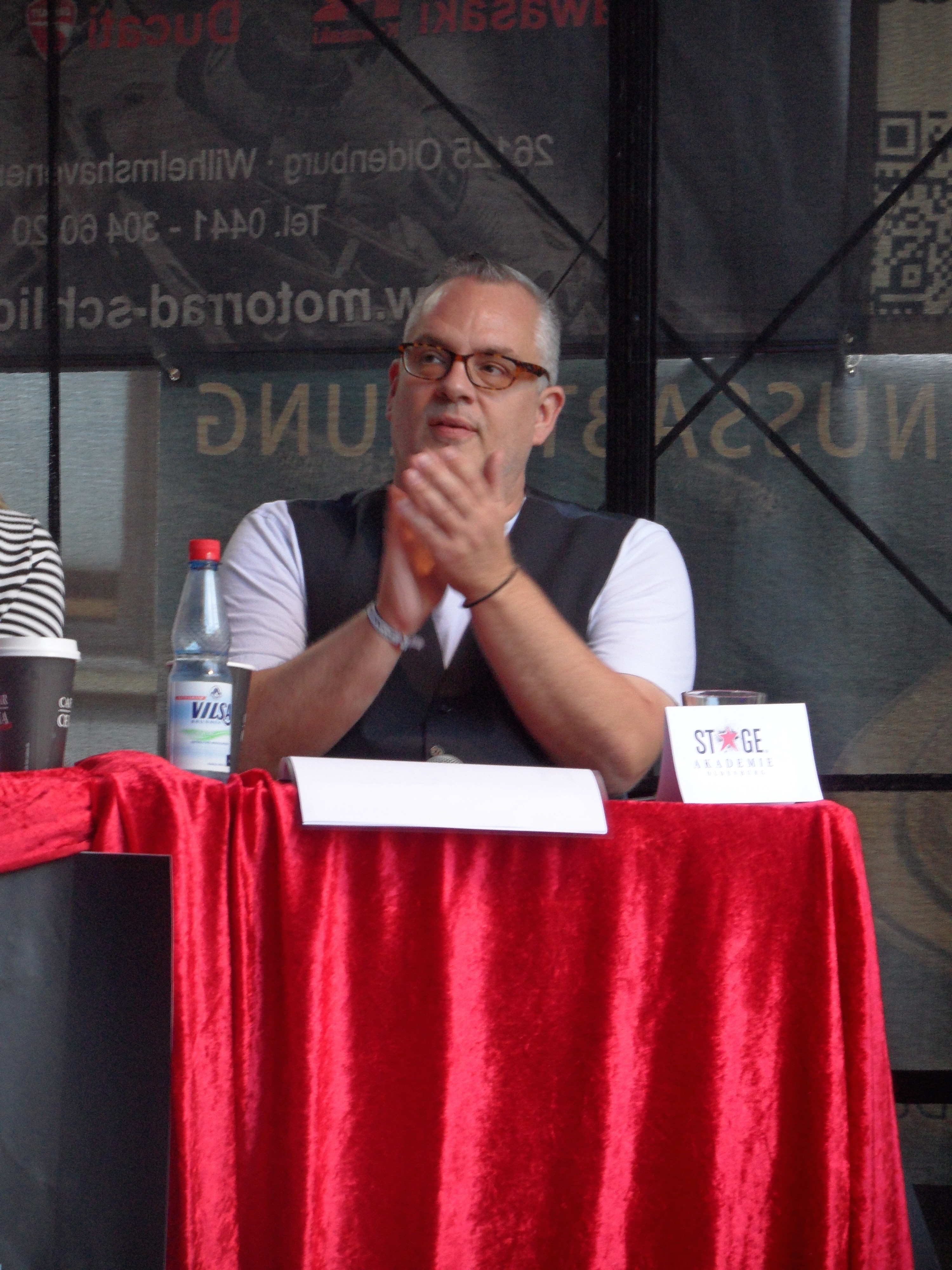 Martin Stoeck beim Stage Academy-Casting in Oldenburg